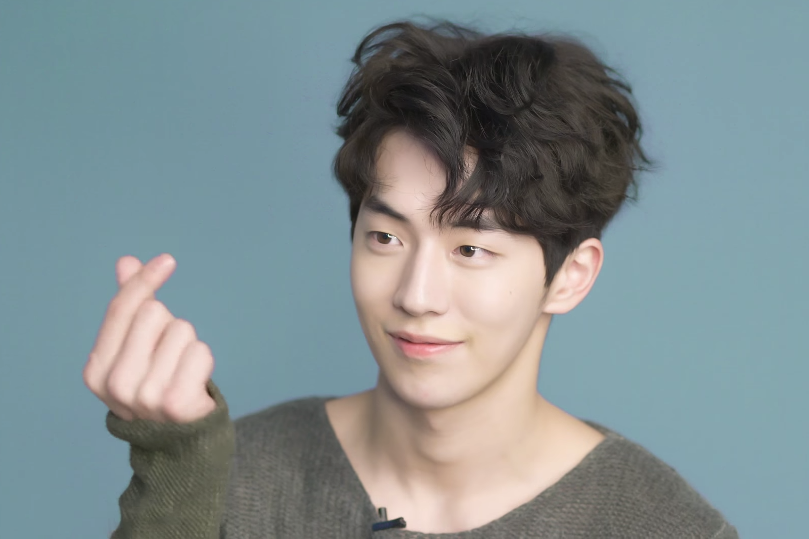 [뷰티쁠] 4월호 남주혁 화보 스케치